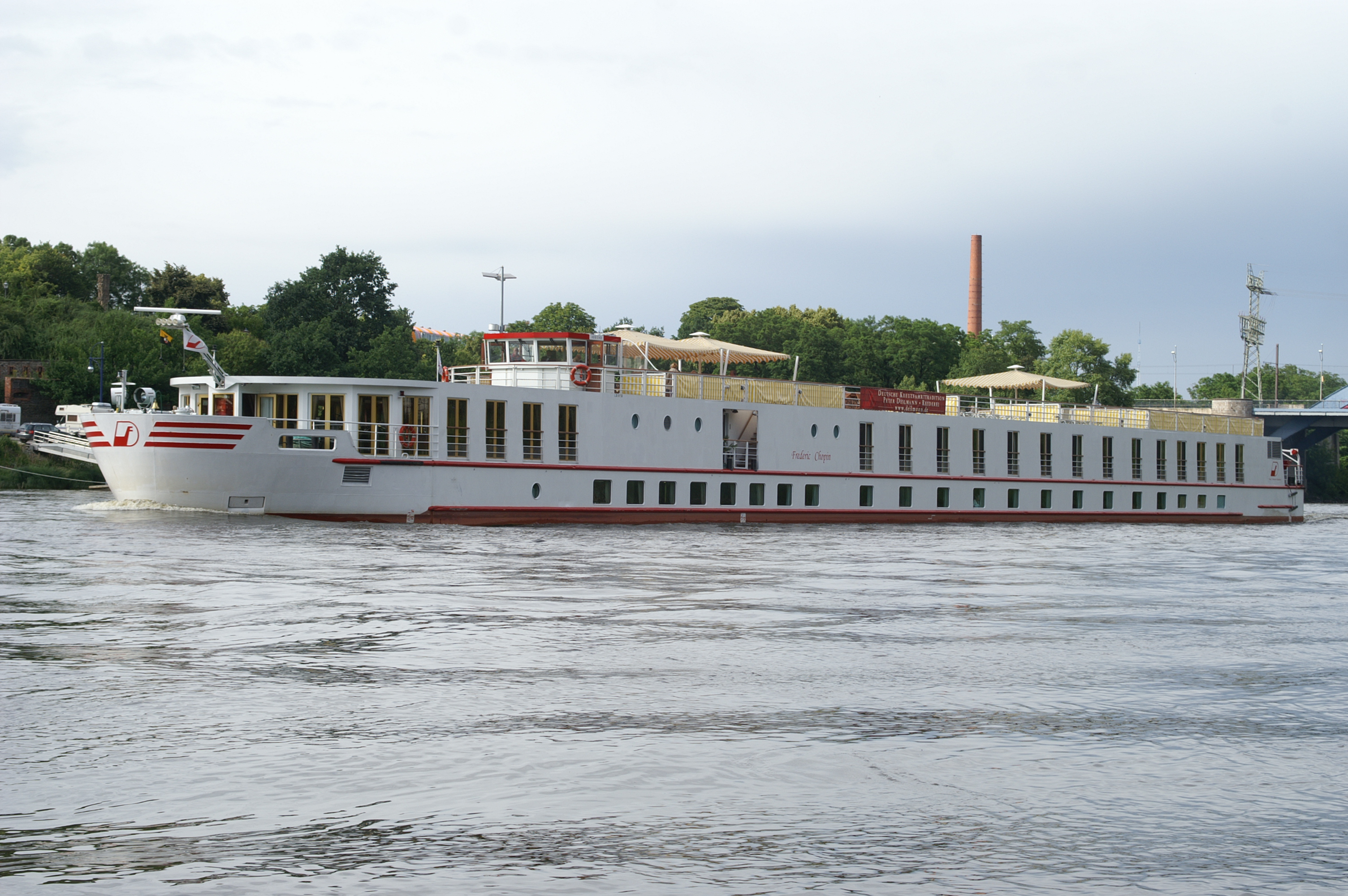 Kabinenfahrgastschiff Frederic Chopin auf der Elbe bei der Insel Werder-Rotehorn, Magdeburg in Sachsen-Anhalt.